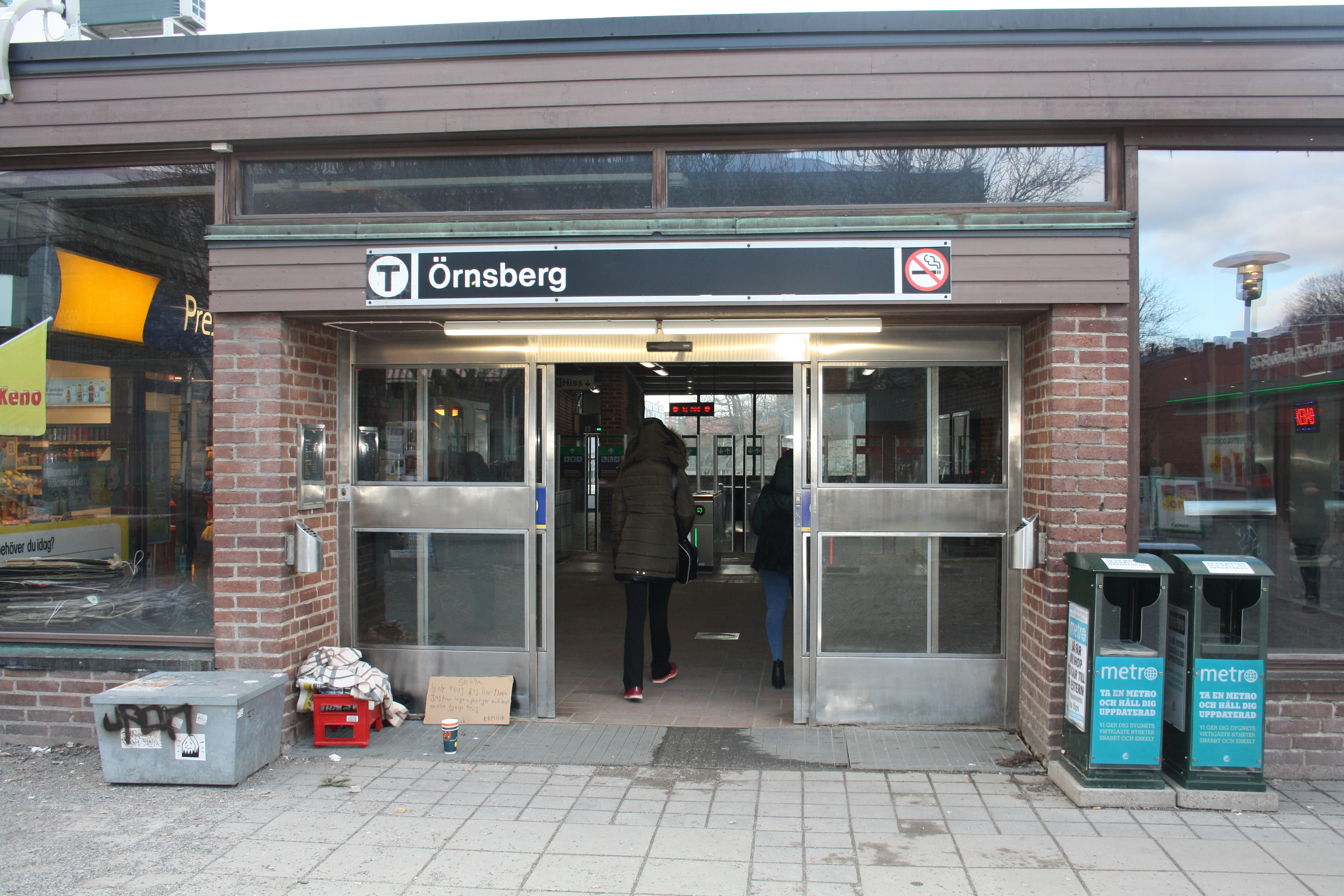 Örnsberg tbana